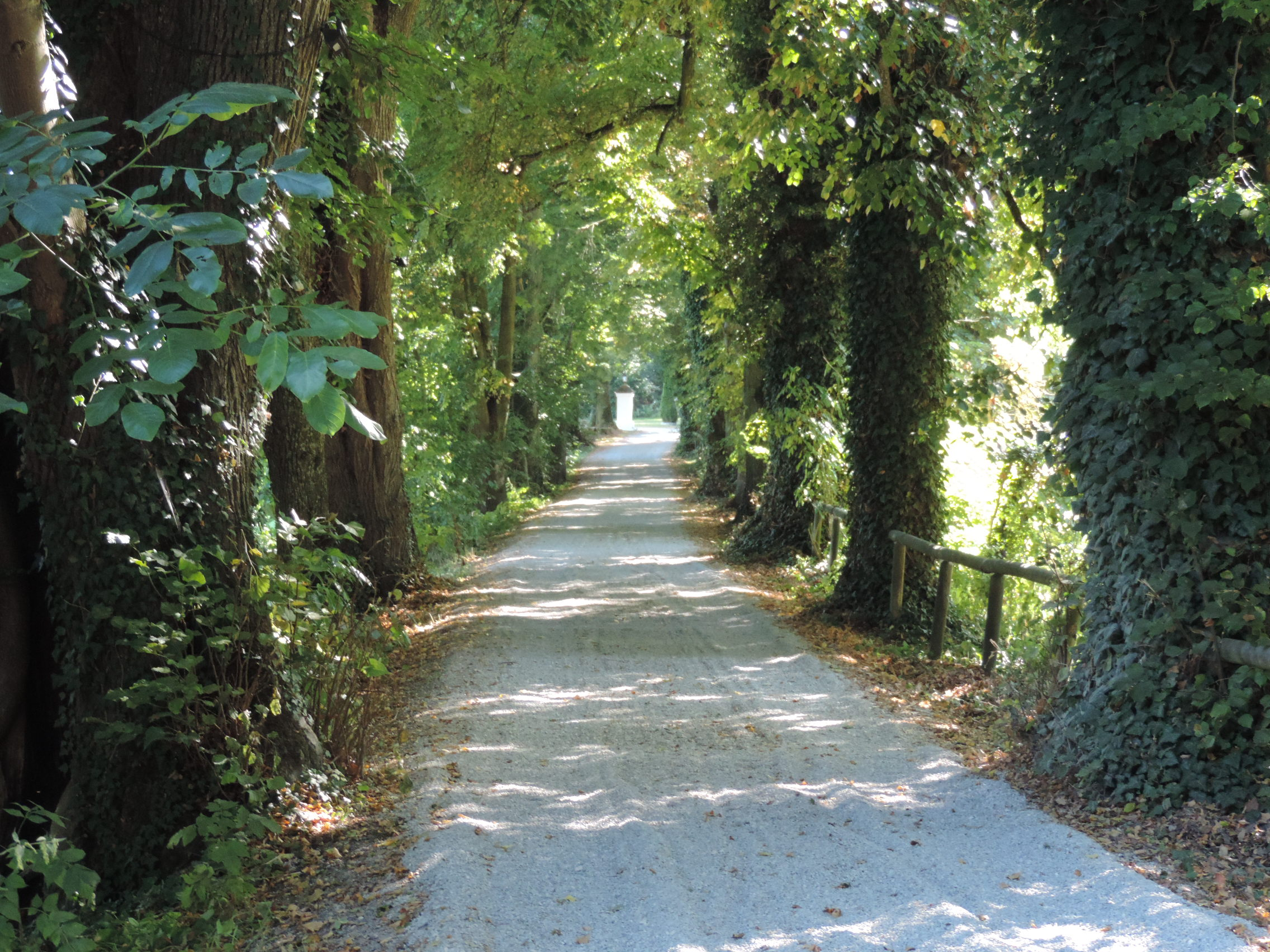 Schlossallee Neuburg im Kammeltal